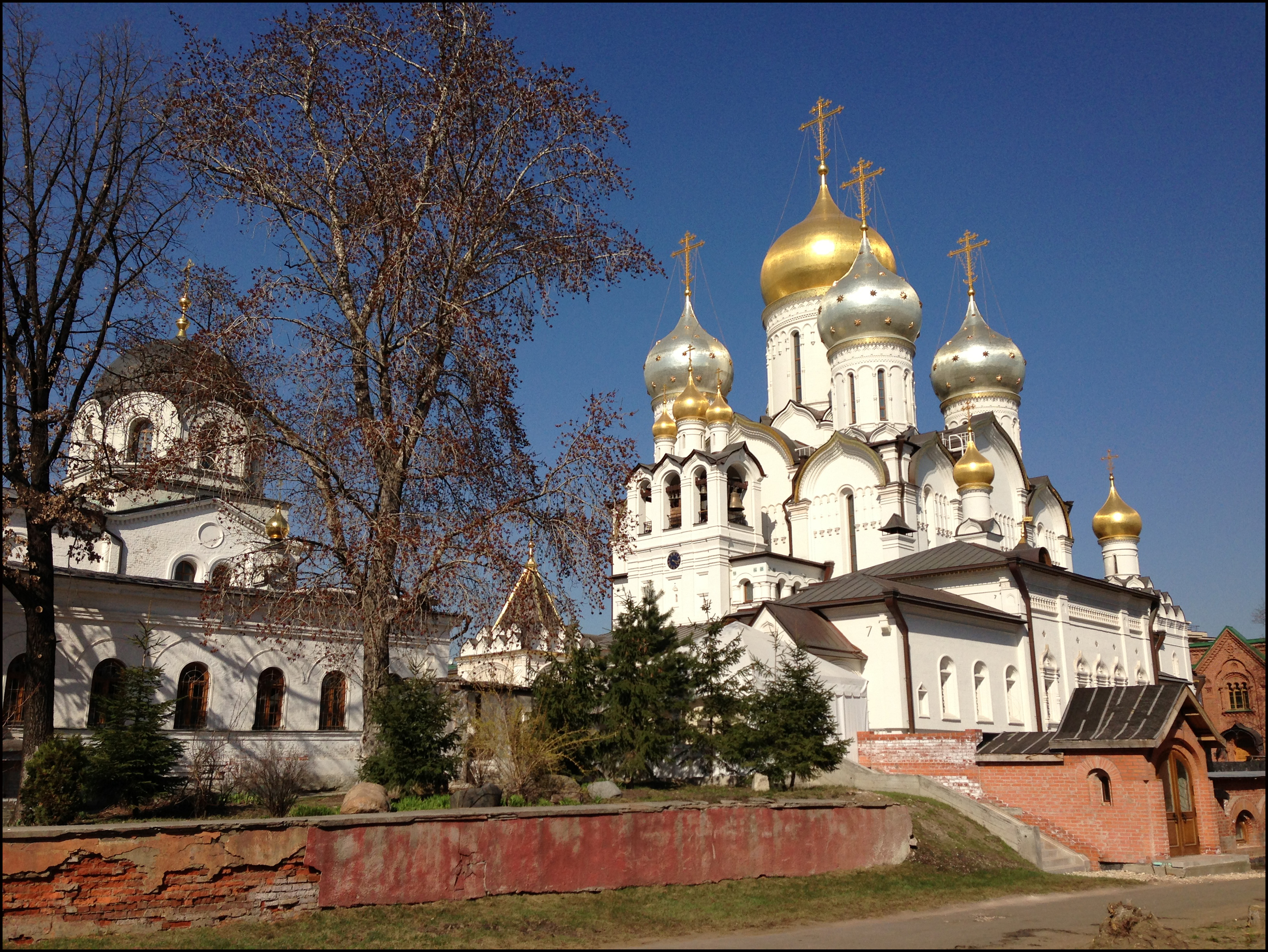 Зачатьевский монастырь